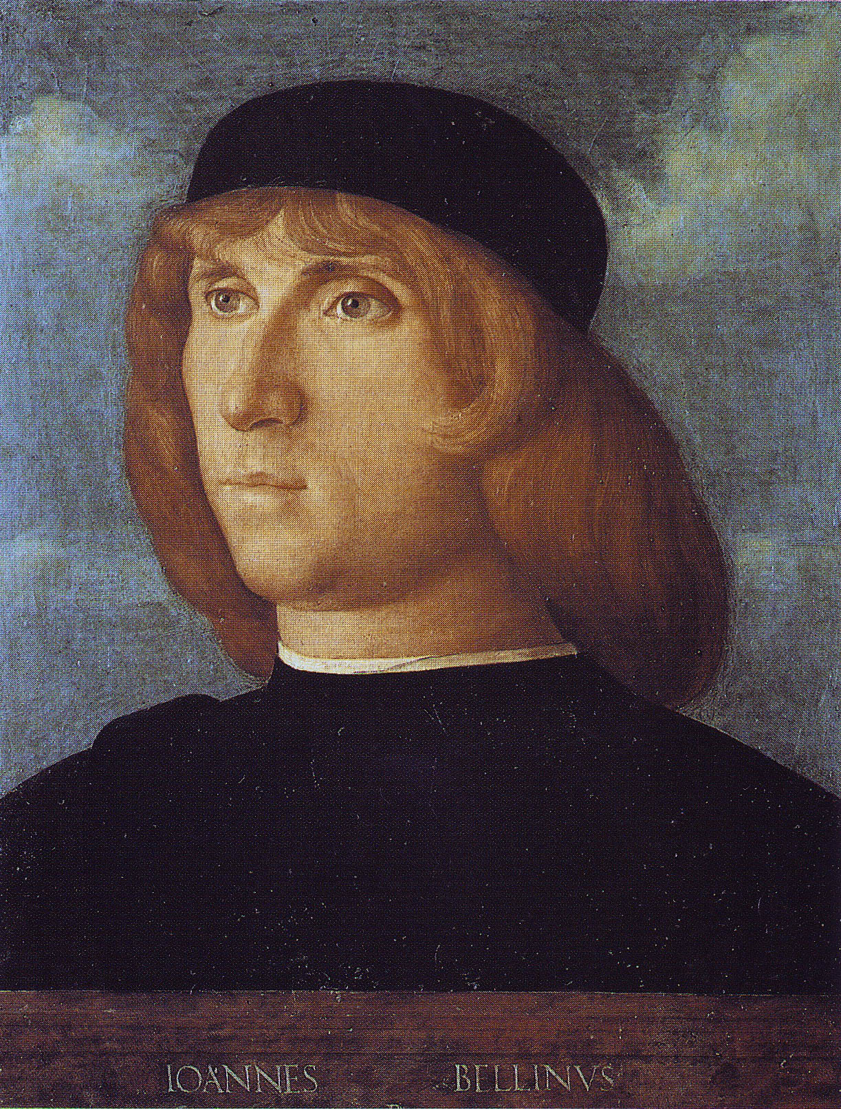 Self-portrait